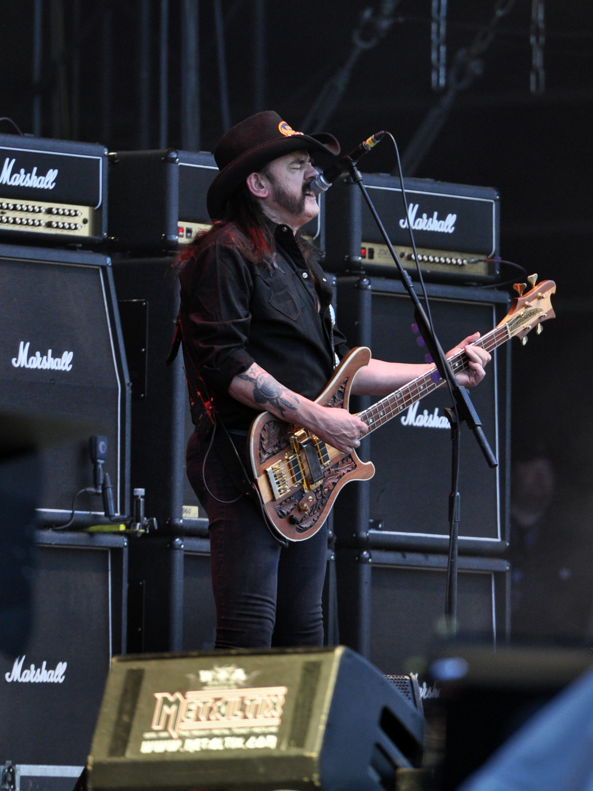 Motörhead at Wacken Open Air 2013